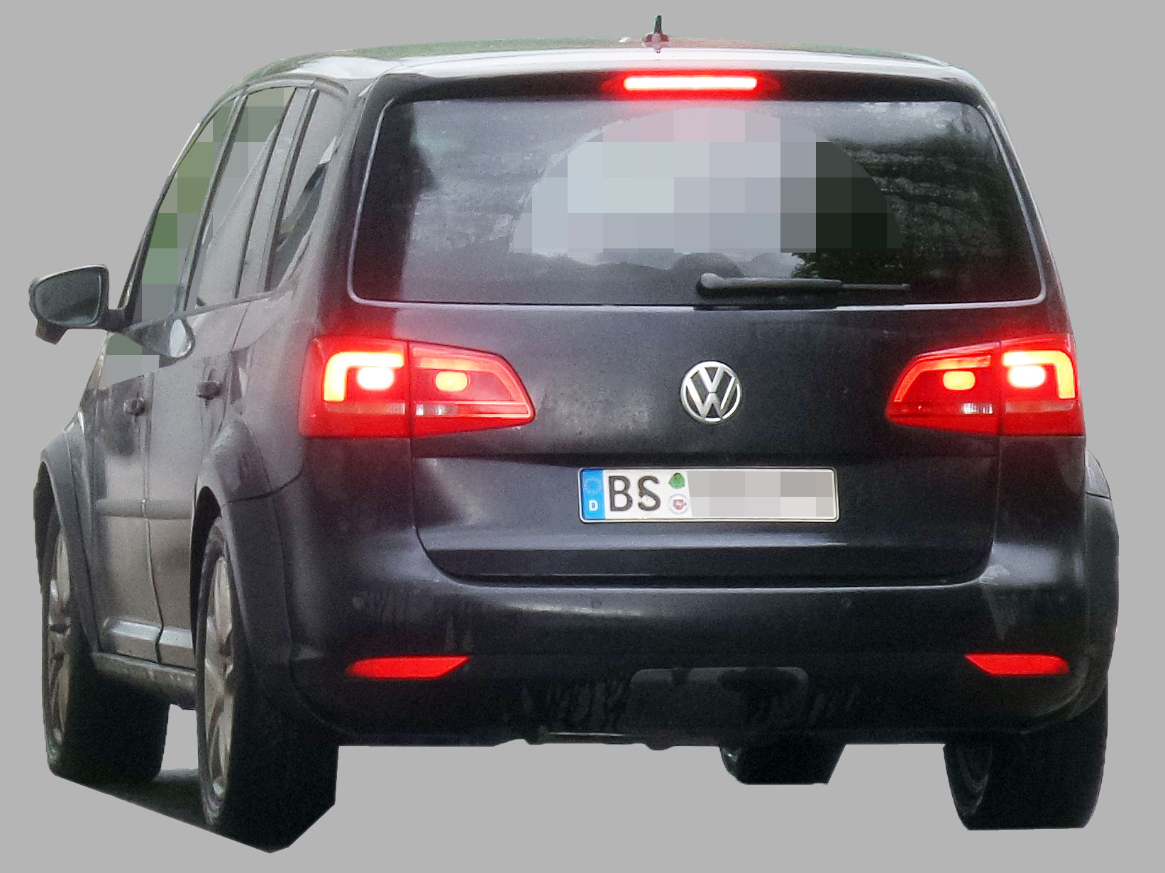 Muletto mit VW Touran (GP2) Karosserie; verbreiterte Kotflügel